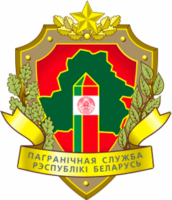 Геральдычны знак Дзяржаўнага пагранічнага камітэта